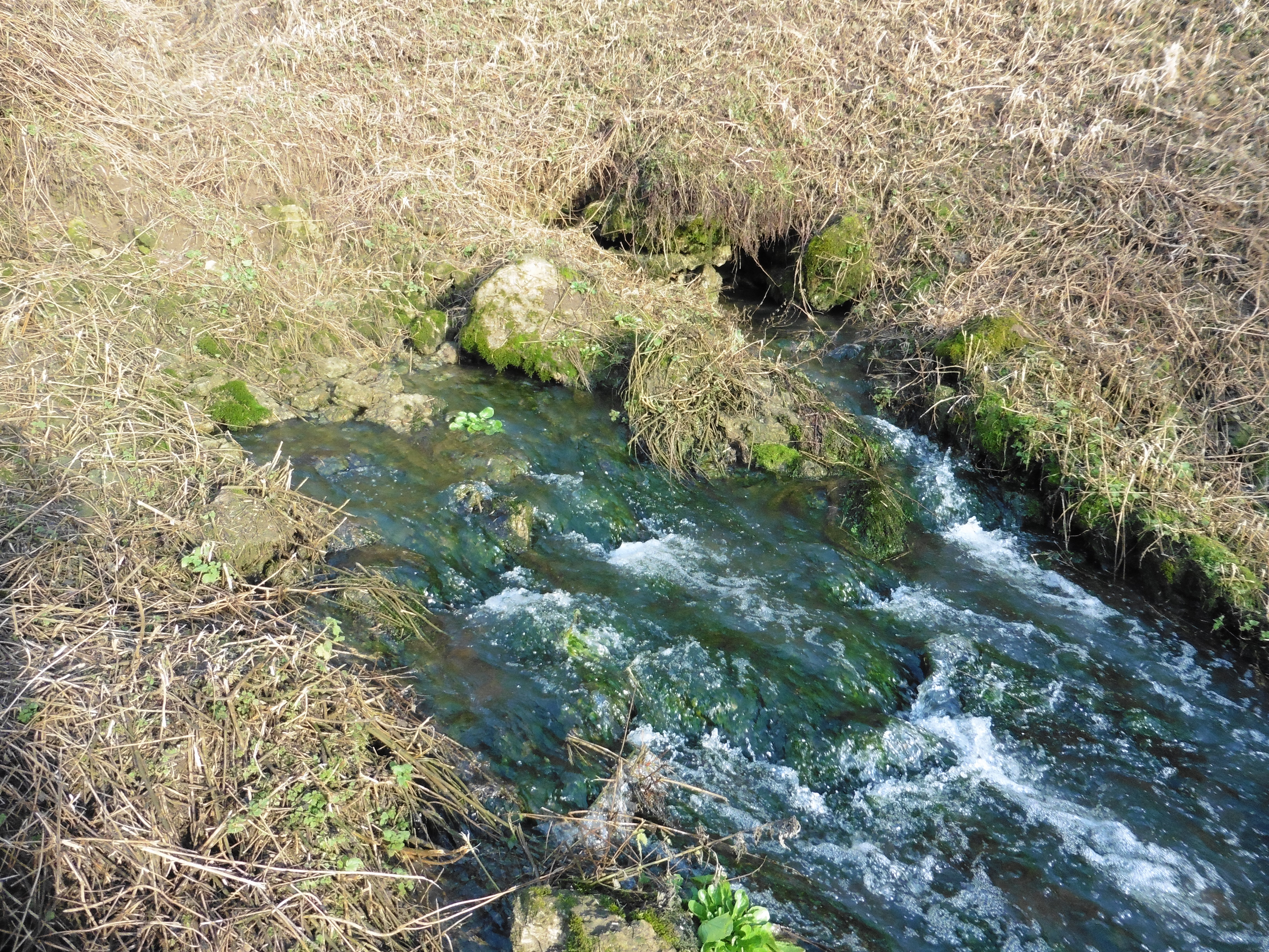 Résurgence